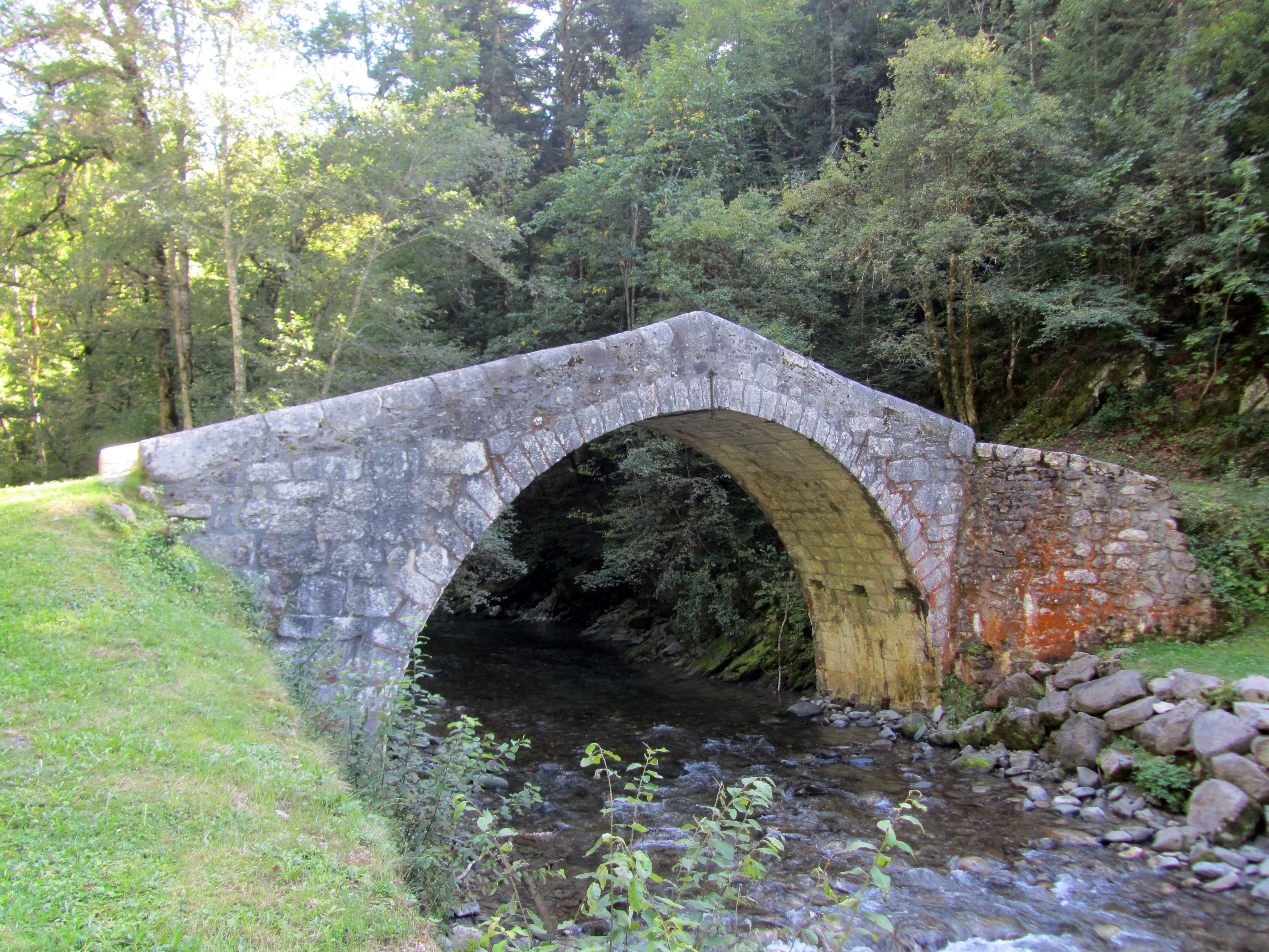 Pont historique dit Pont Romain, sur le Fier près de la village de Les Clefs